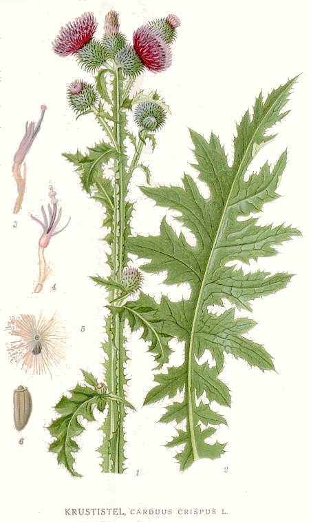 Original Description Krustistel, Carduus crispus L.